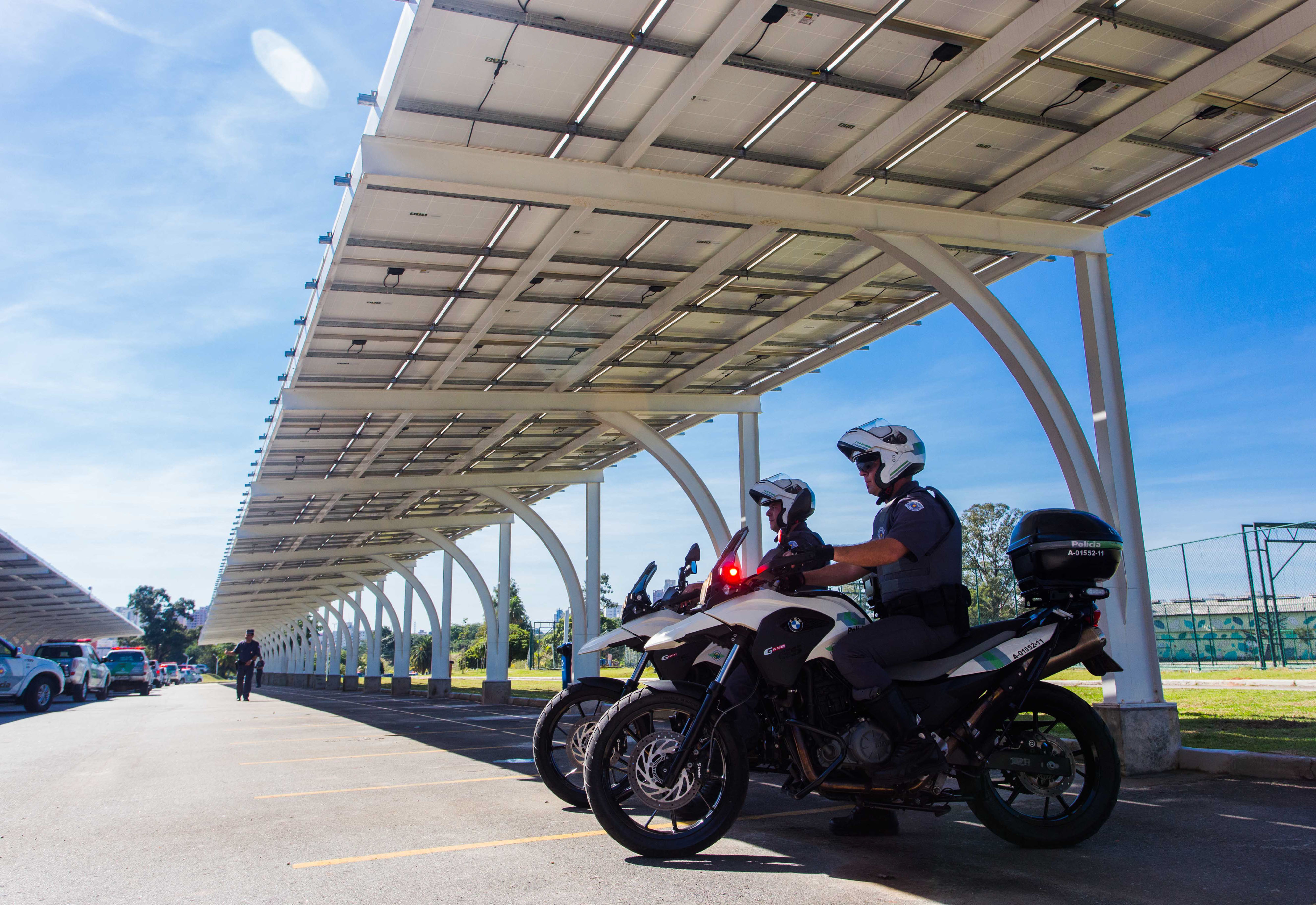 O Governador do Estado de São Paulo Geraldo Alckmin, participou da Assinatura do Dejem Ambiental+Início de Operação das Placas Fotovoltaicas do Parque Villa Lobos. Local: São Paulo/SP. Data: 26/05/2017. Foto: Alexandre Carvalho/A2img